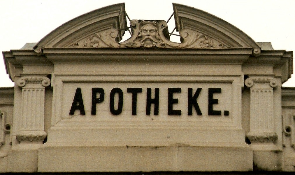 Detail von Mühsams Apotheken-Gebäude, Ecke zur Moislinger Allee